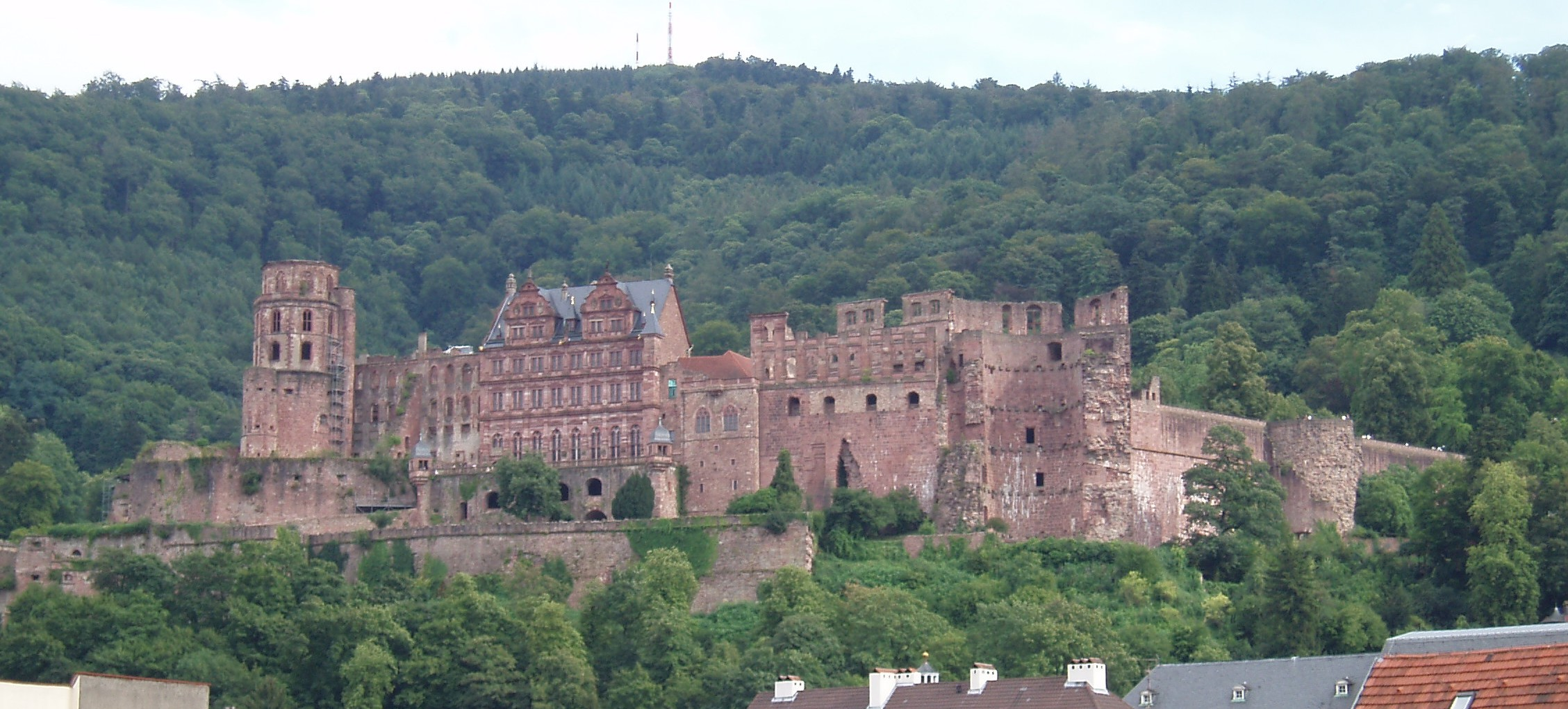 Heidelberg - castle